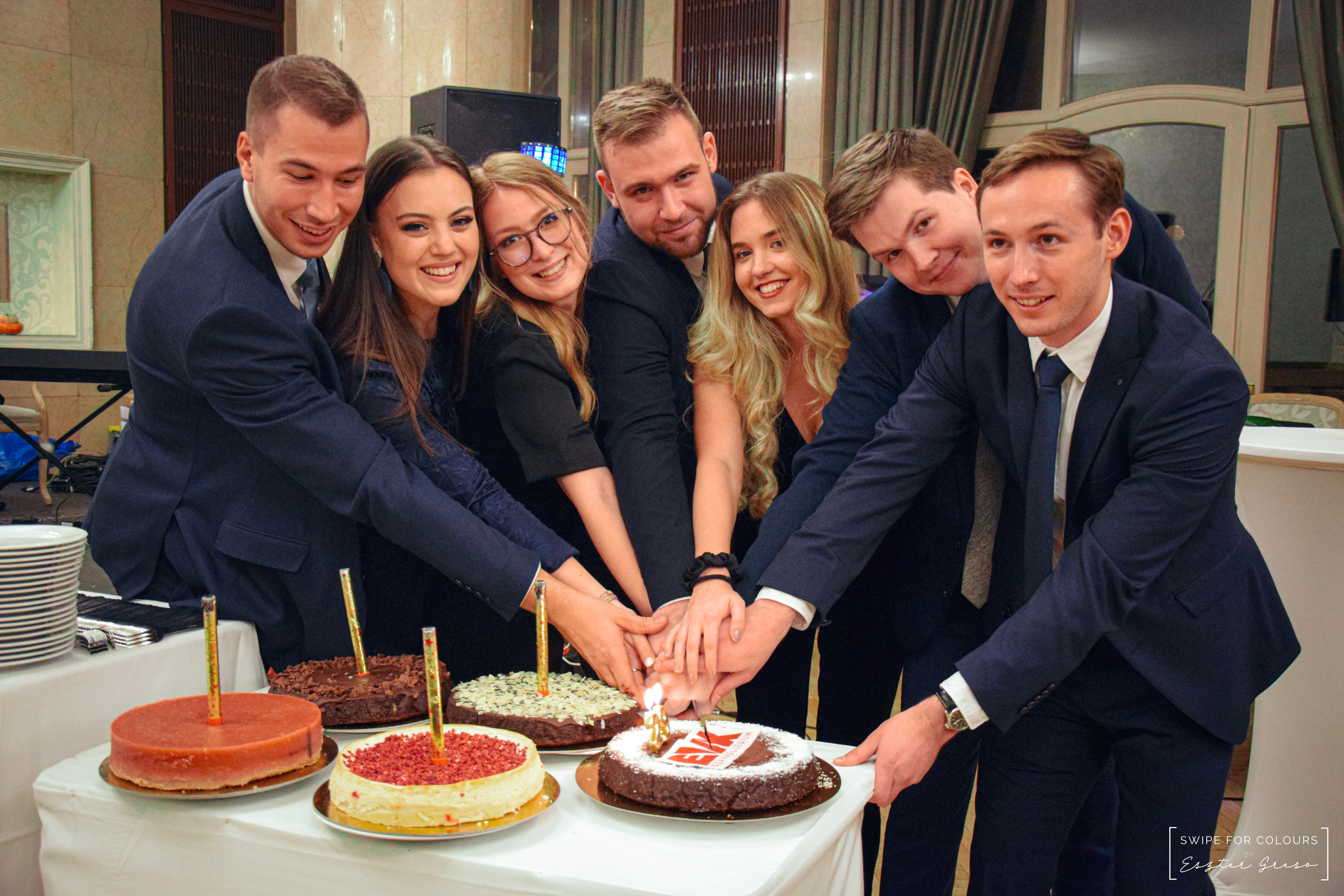 A vezetőségi tagok felvágják a tortát